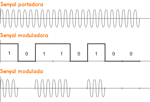 Introducció a la modulació digital